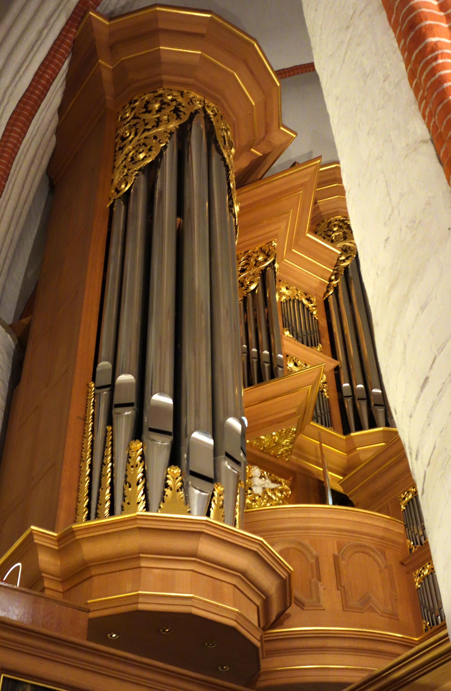 Schnitger-Orgel in Sankt Jacobi, Hamburg, Deutschland